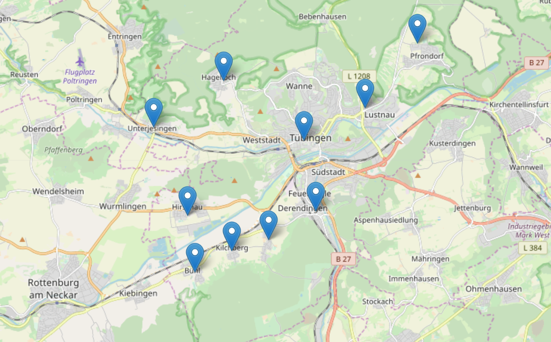 Karte der Wachen der Feuerwehr Tübingen